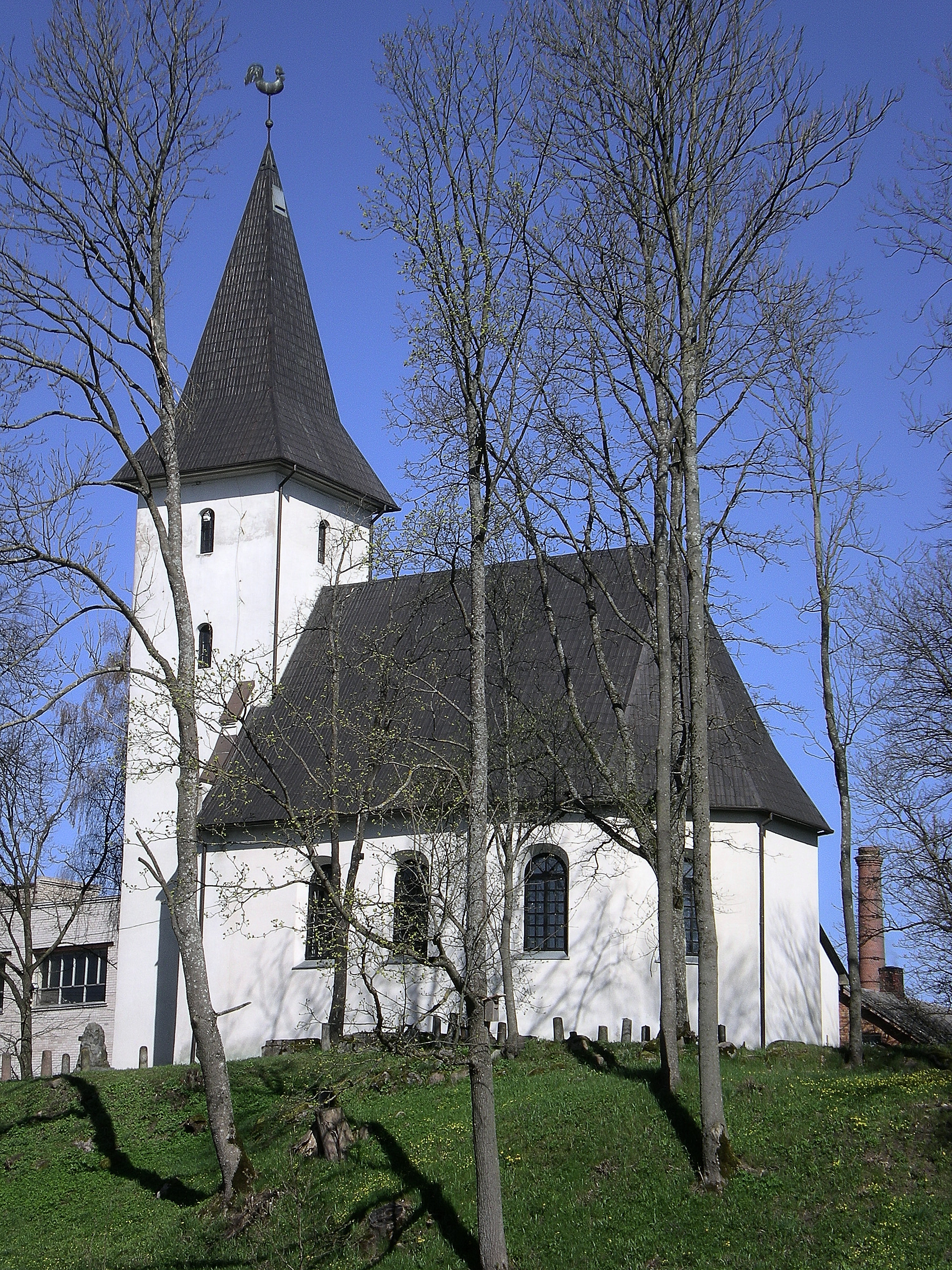 Priekule church